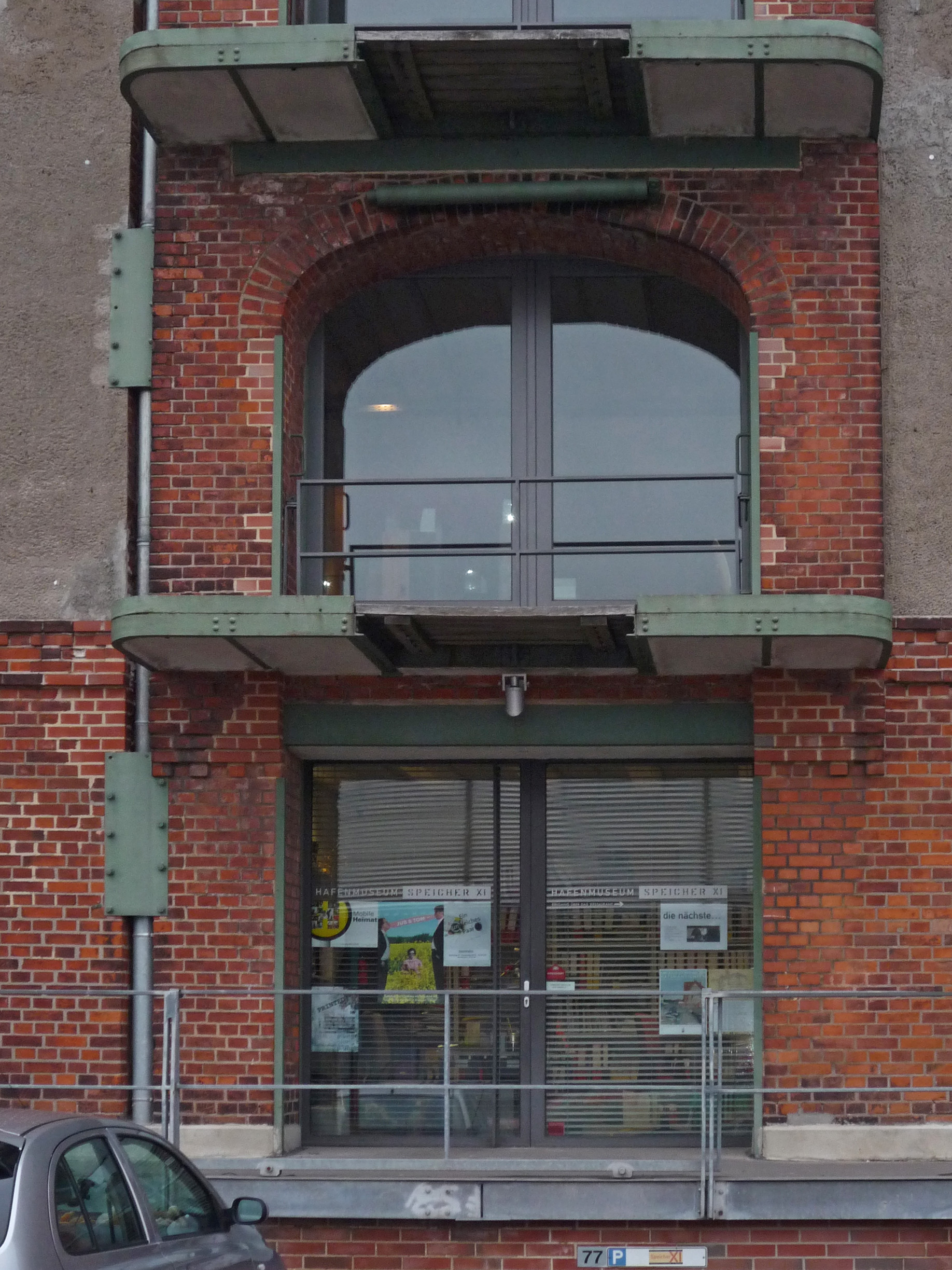 Hafenmuseum Eingang Speicher XI in Bremen, Am Speicher XI 1, 2, 3, 4, 5, 6, 7, 8 / Eduard-Suling-Straße.Das abgebildete Objekt ist ein geschütztes Kulturdenkmal in der Freien Hansestadt Bremen, mit der Nr. 0324 beim Landesamt für Denkmalpflege registriert.